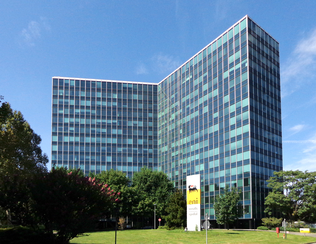 San Donato Milanese, il secondo palazzo degli uffici ENI nel quartiere di Metanopoli. Fu costruito dal 1961 al 1962 su progetto di Marco Bacigalupo e Ugo Ratti.Fonte: Maurizio Grandi e Attilio Pracchi, Milano. Guida all'architettura moderna, Bologna, Zanichelli [1980], 1998, p. 378. ISBN 88-08-05210-9.